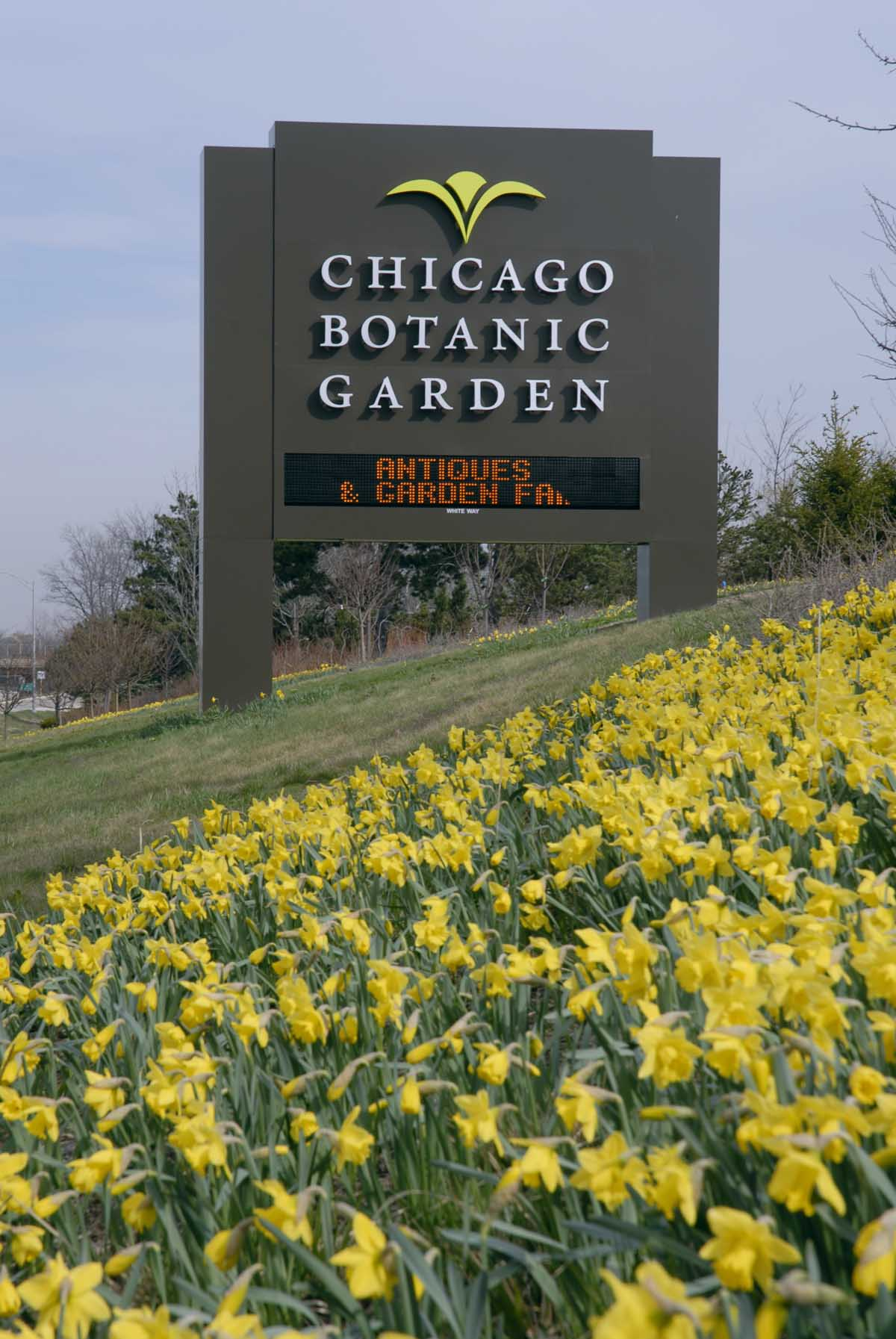 Chicago Botanic Garden Edens sign